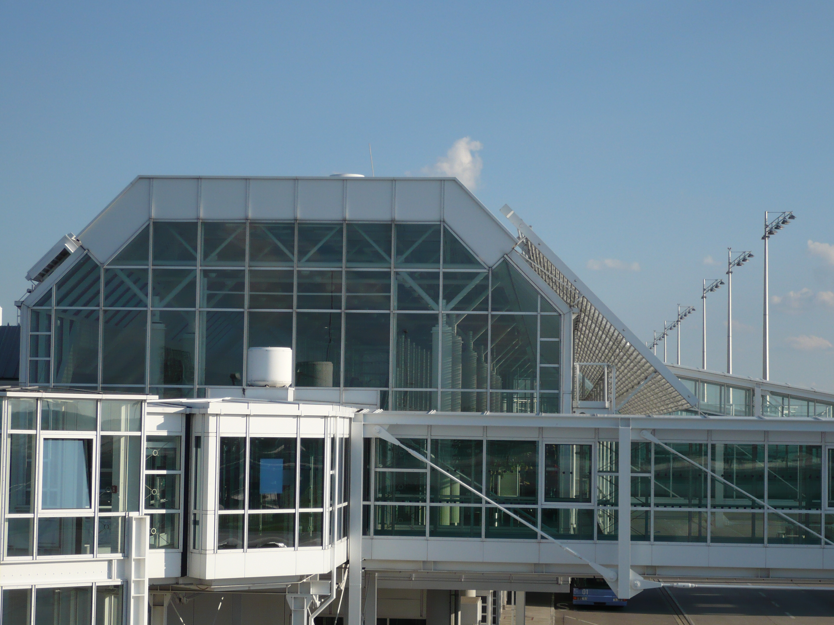 Terminal 1 Flughafen Münchens